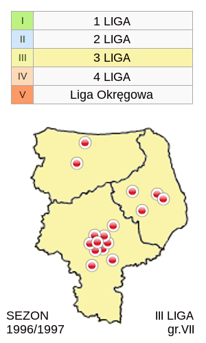 Jagiellonia Białystok w sezonie 1996/1997 -mapka